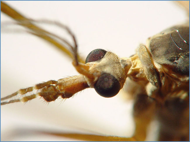 Beschreibung: Schnake, Detail Kopfbereich Aufnahmedatum: 9. September 2002 Fotograf: ArtMechanic